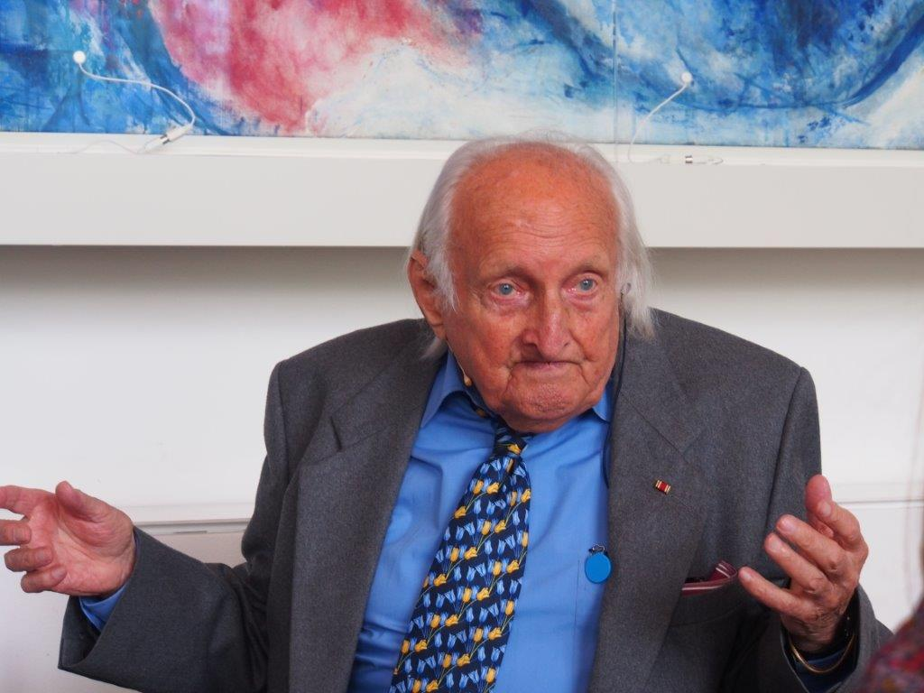 Das Foto zeigt Wolfgang Lauinger im Mai 2015 im Chagallsaal der Oper Frankfurt während der Vorstellung des Buches "Lauingers. Eine Familiengeschichte aus Deutschland".